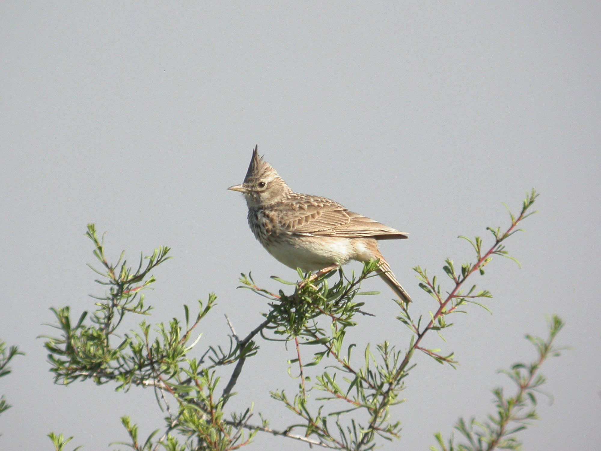 Galerida theklae (Alaudidae). Rivas Vaciamadrid, Madrid, España.